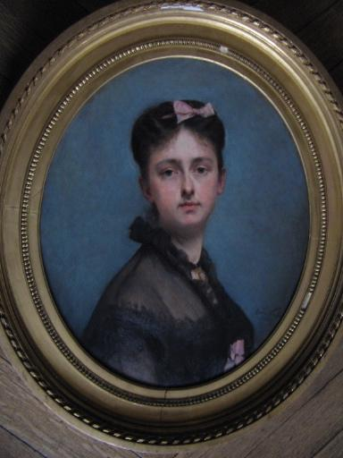 Joconde database: entry M0796000222